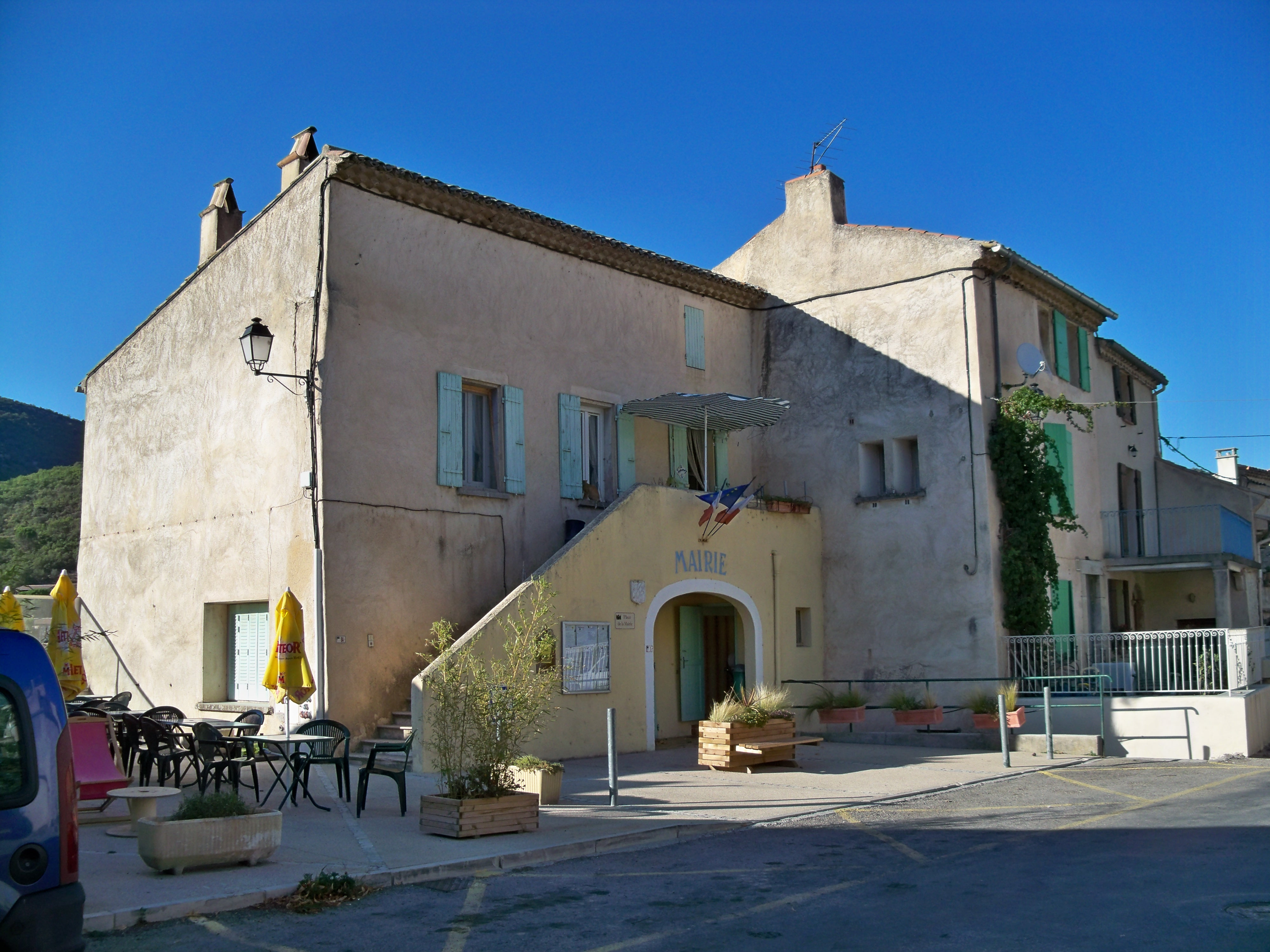 Mairie de Curnier (26)